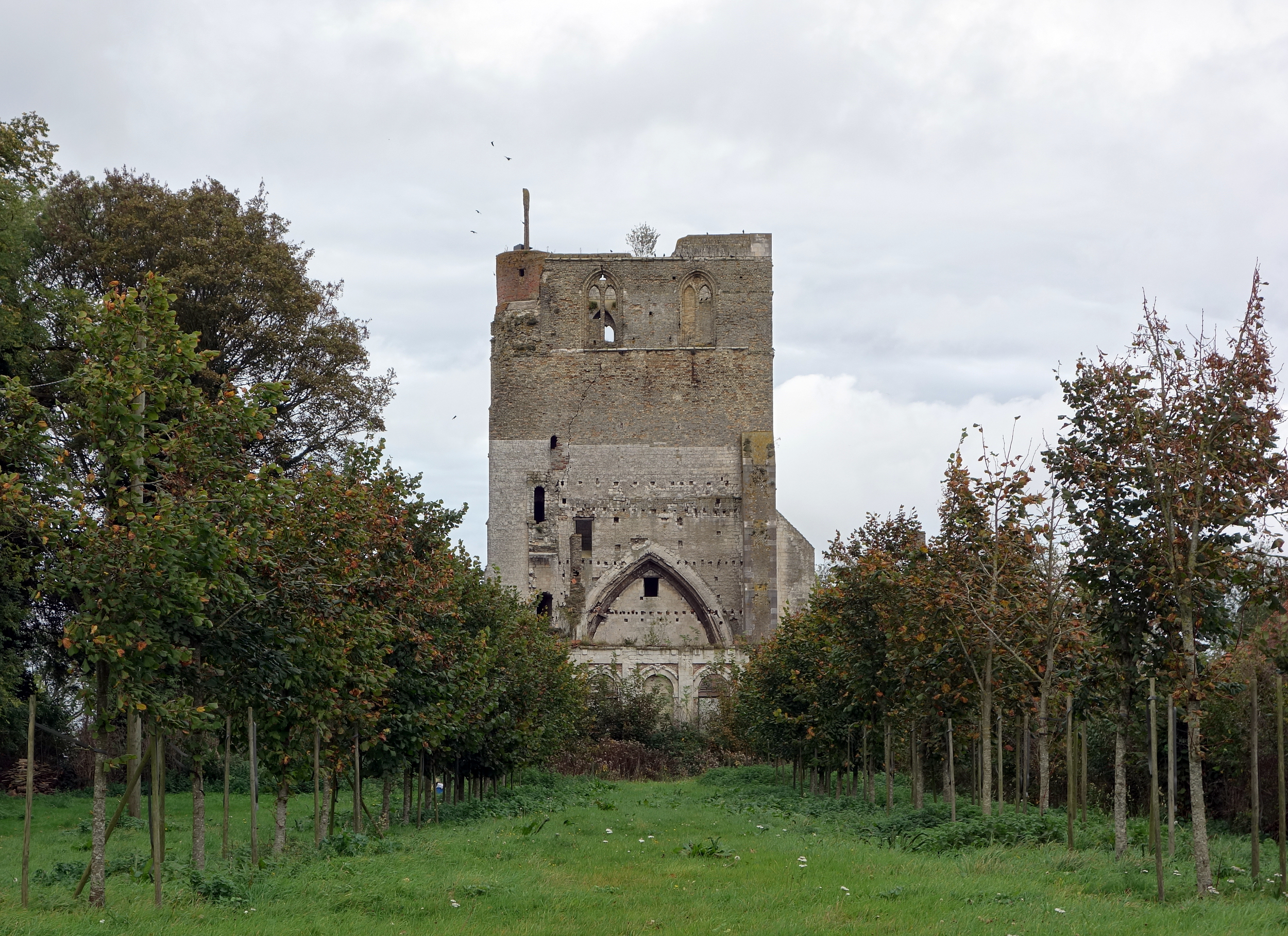 L'Abbaye Notre-Dame du Mont à Watten.